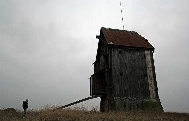 Wiatrak-koźlak z roku 1842 w Buszkowicach